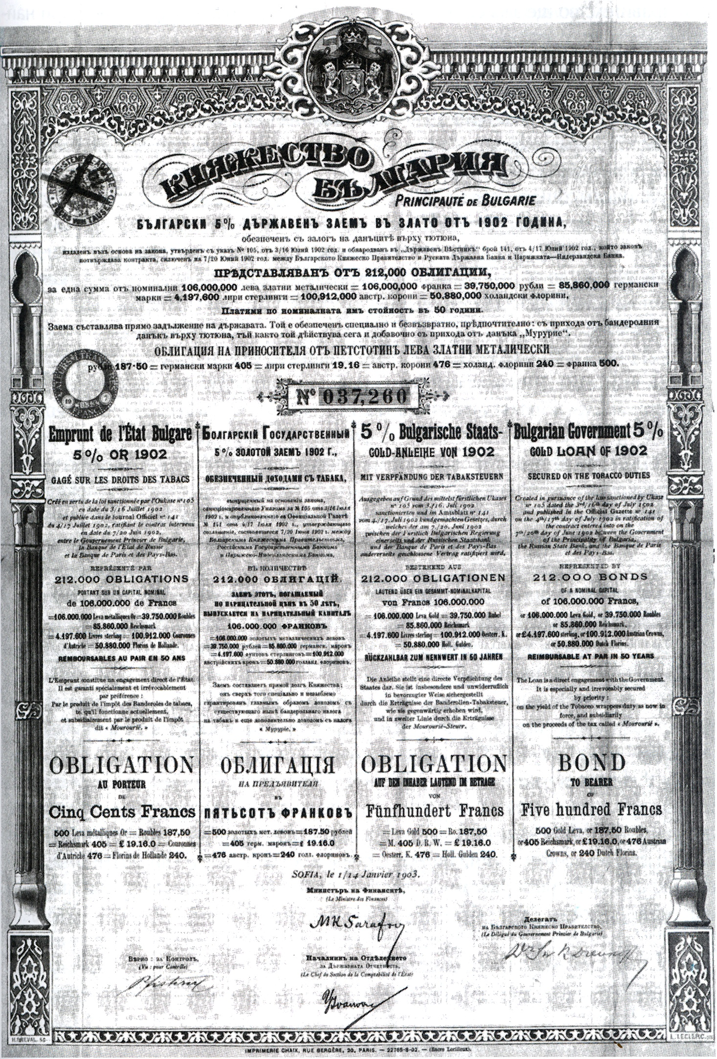 Българска държавна облигация от 1902 година